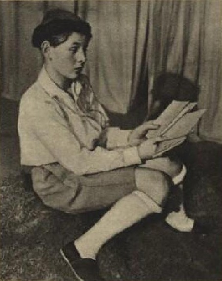 Vladimír Salač (1924-1990), český herec a zpěvák